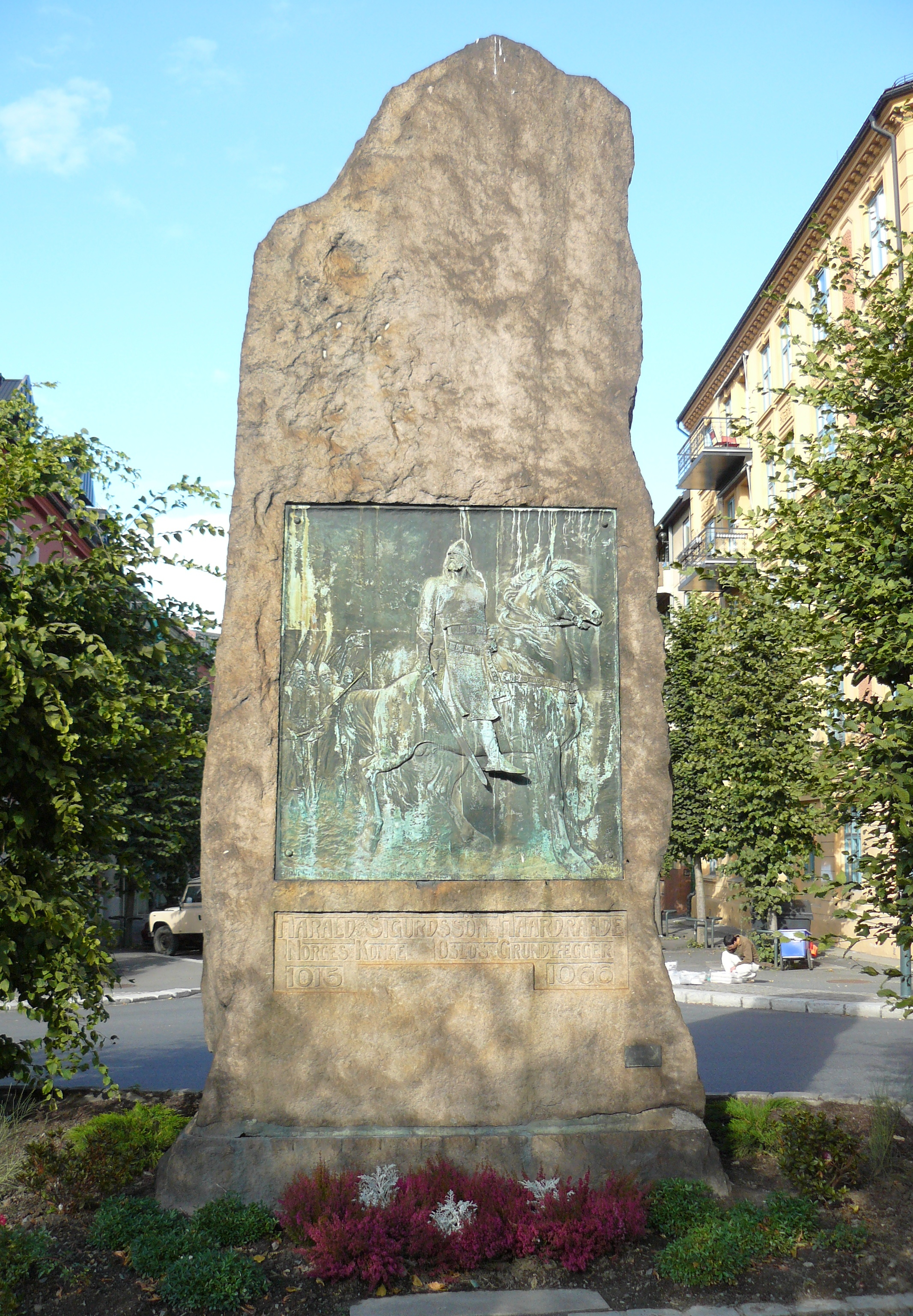 Harald Hardråde, Monumental stone, Oslo